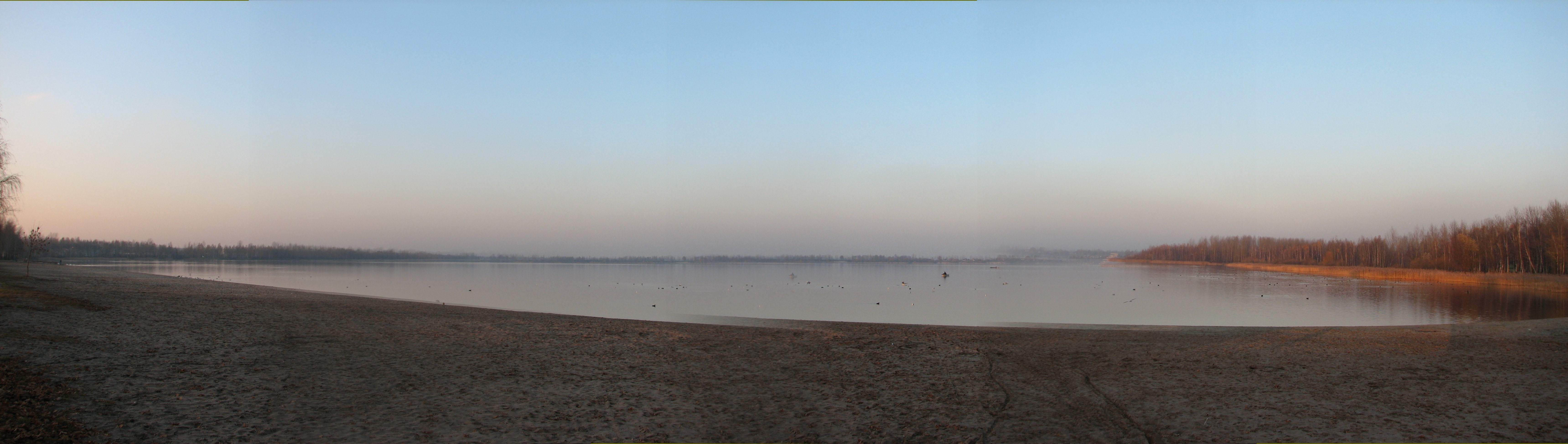 Panorama Pogorii III